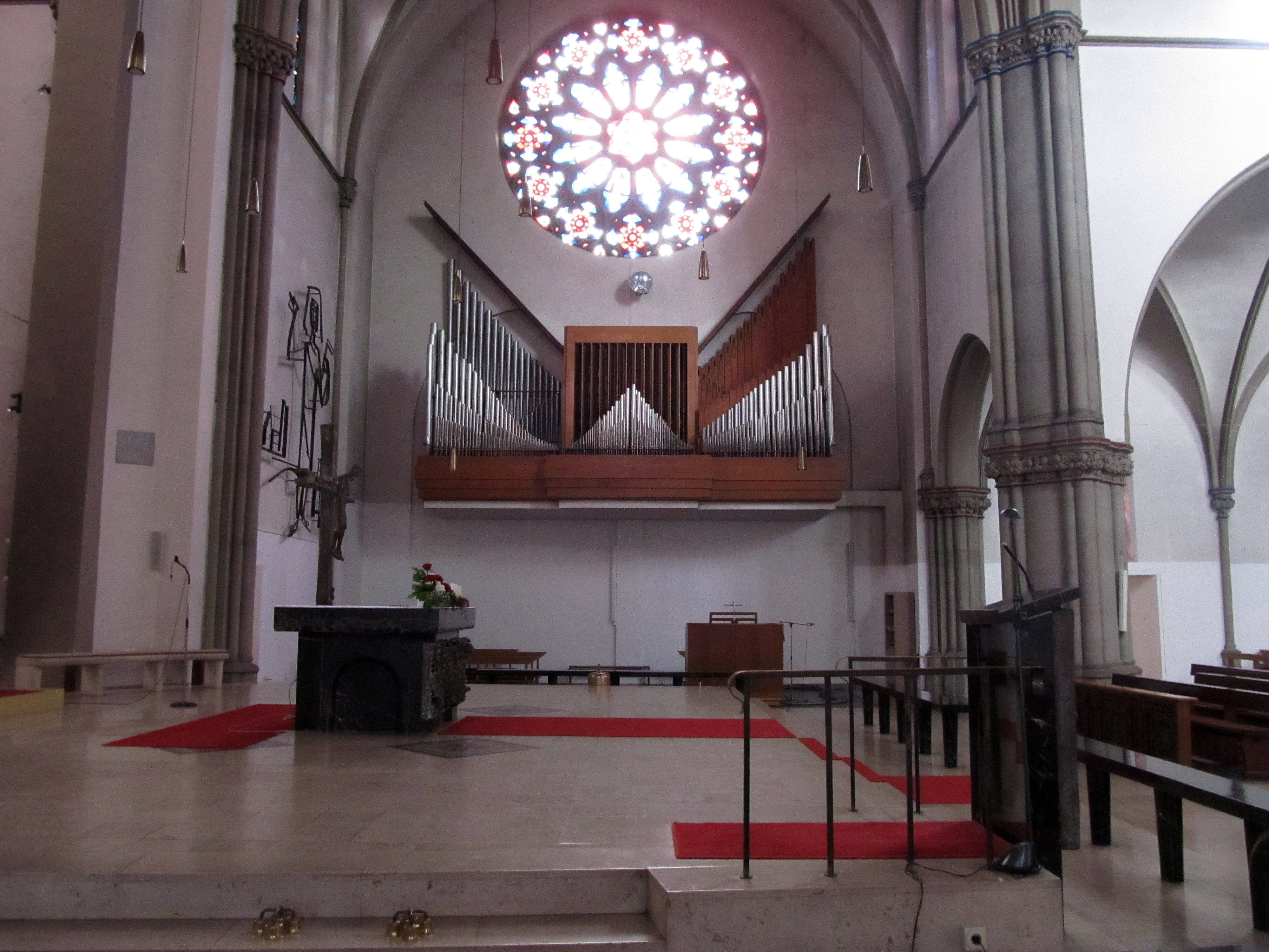 Orgelprospekt der katholischen Pfarrkirche St. Josef in Saarbrücken-Malstatt, Saarland